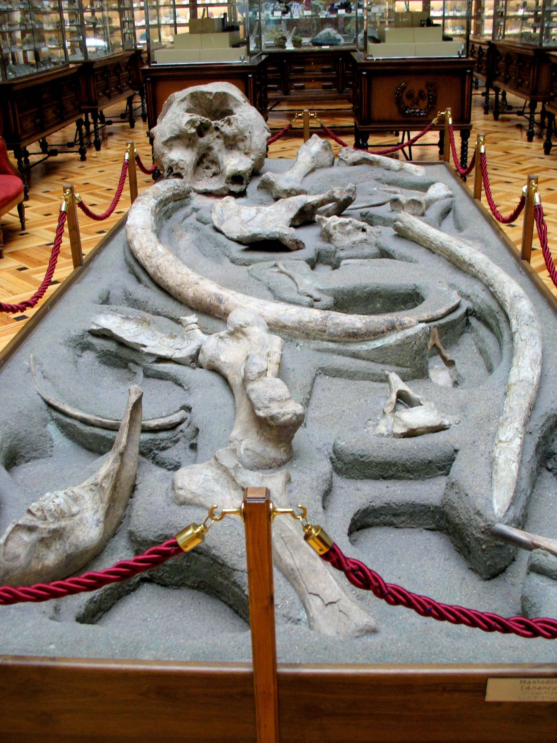 Anancus arvernensis. Yacimiento plioceno de Las Higueruelas (Ciudad Real, España). Ejemplar en exhibición en el Museo Geominero de Madrid. Museo Geominero: Yacimiento paleontológico de las Higueruelas.